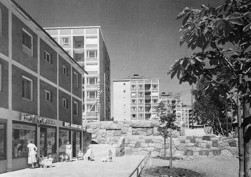 Kärrtorp centrum (invigt 1952) på 1950-talet (Stockholm)